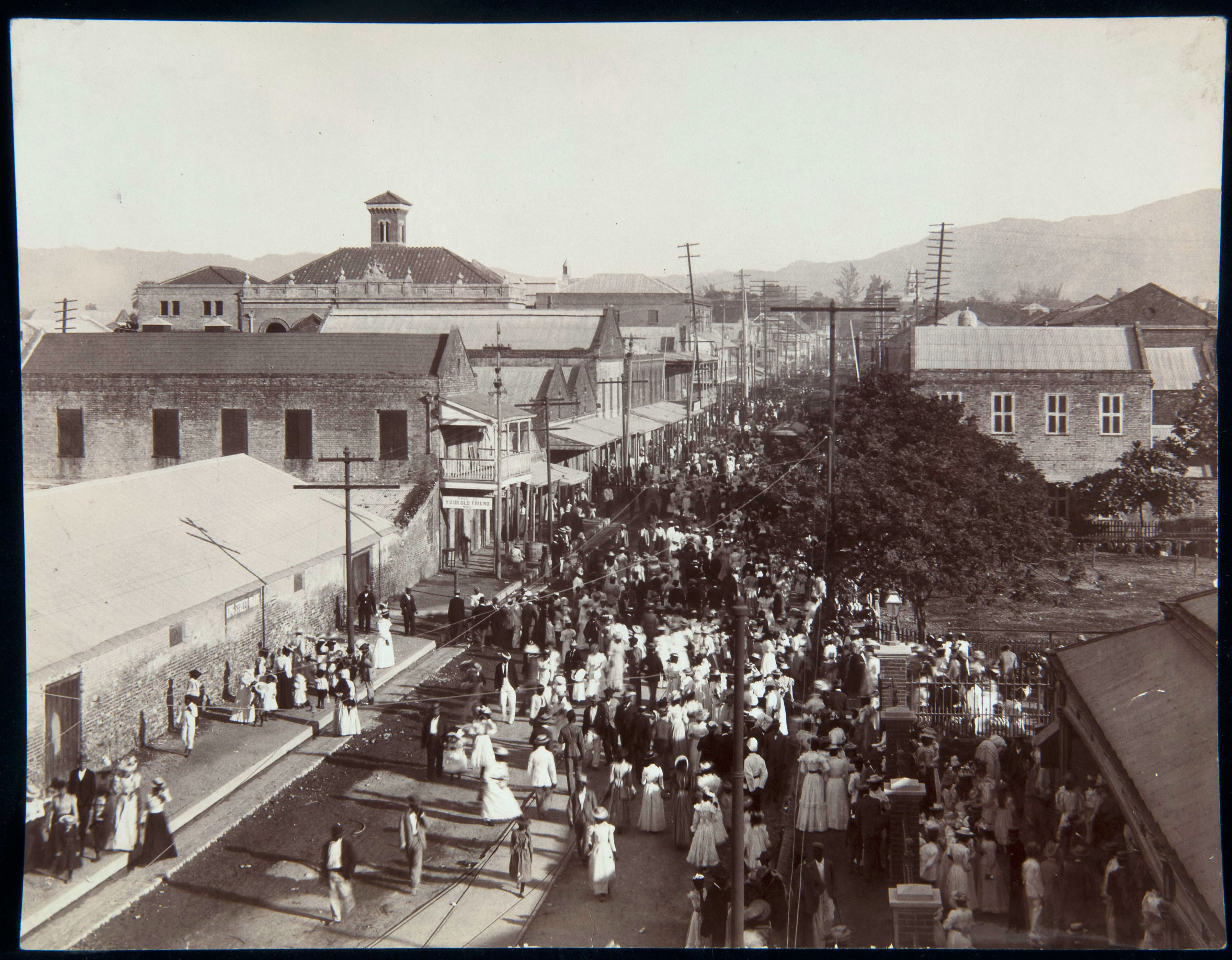 Foto.